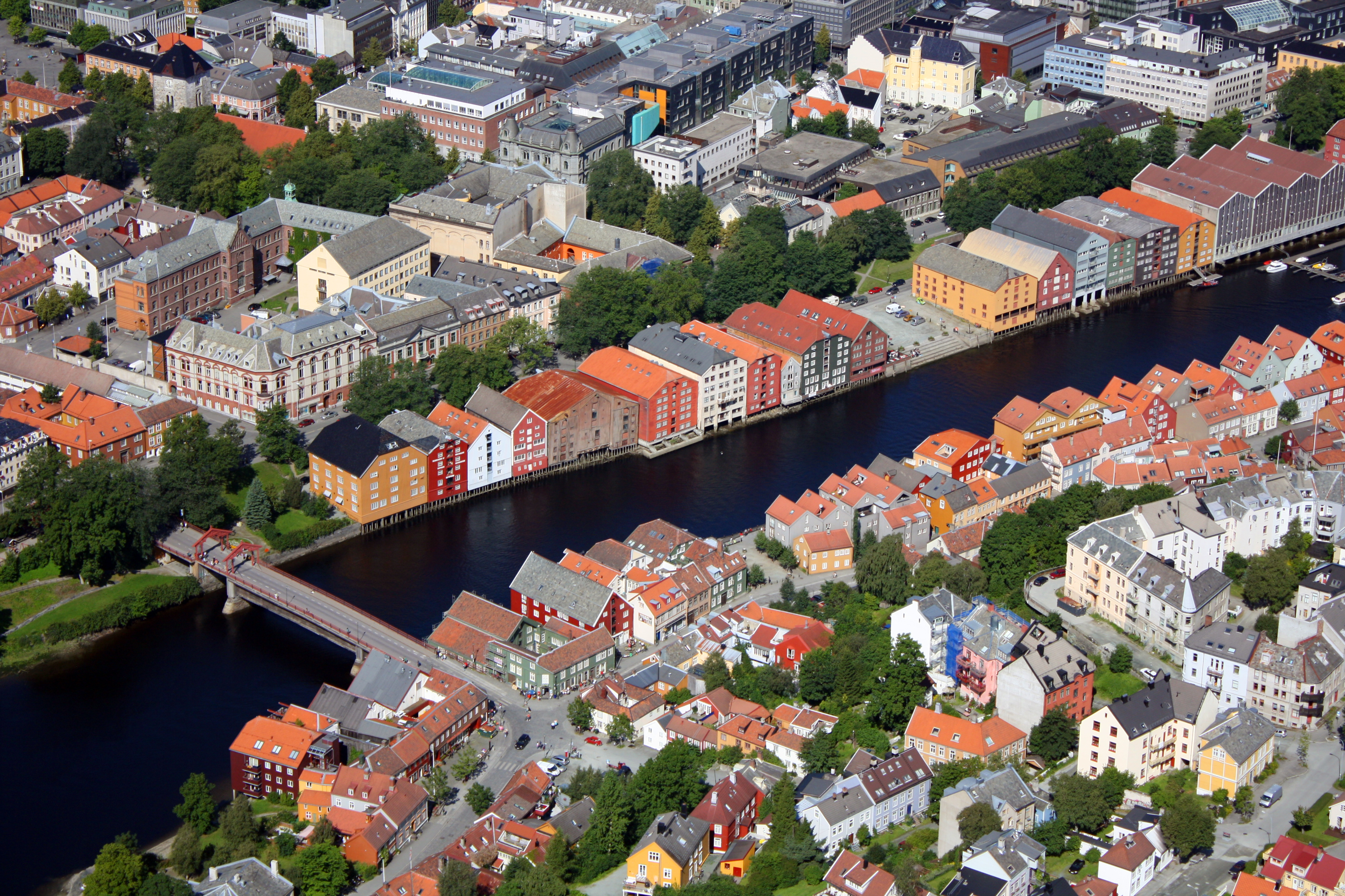 Nedre Bakklandet og Kjøpmannsgata, adskilt av Nidelva. Nedre Bakklandet and Kjøpmannsgata, divided by the Nidelva river in Trondheim, Norway.